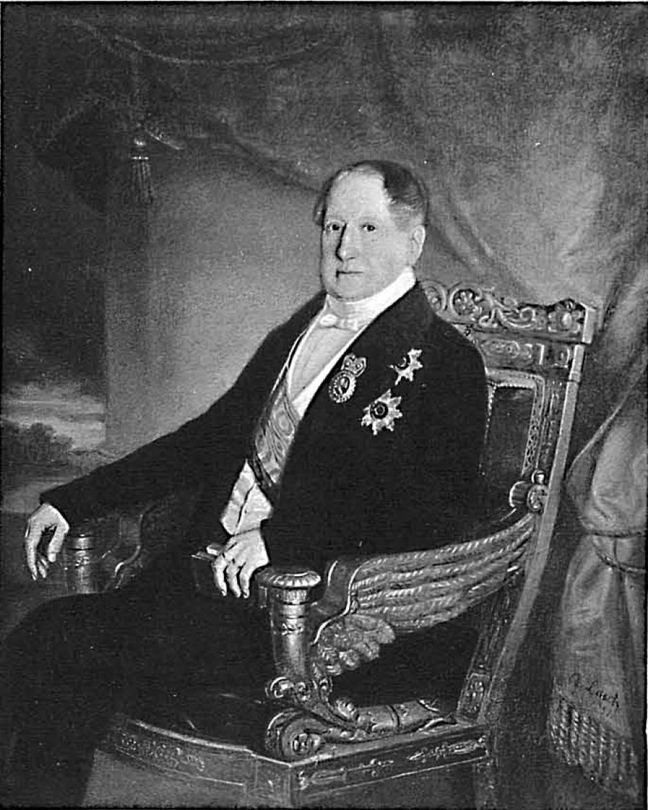 Князь Сергей Михайлович Голицын (1774-1859)